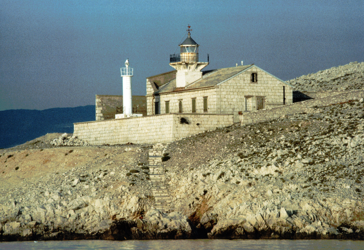 Prvić kod otoka Krka